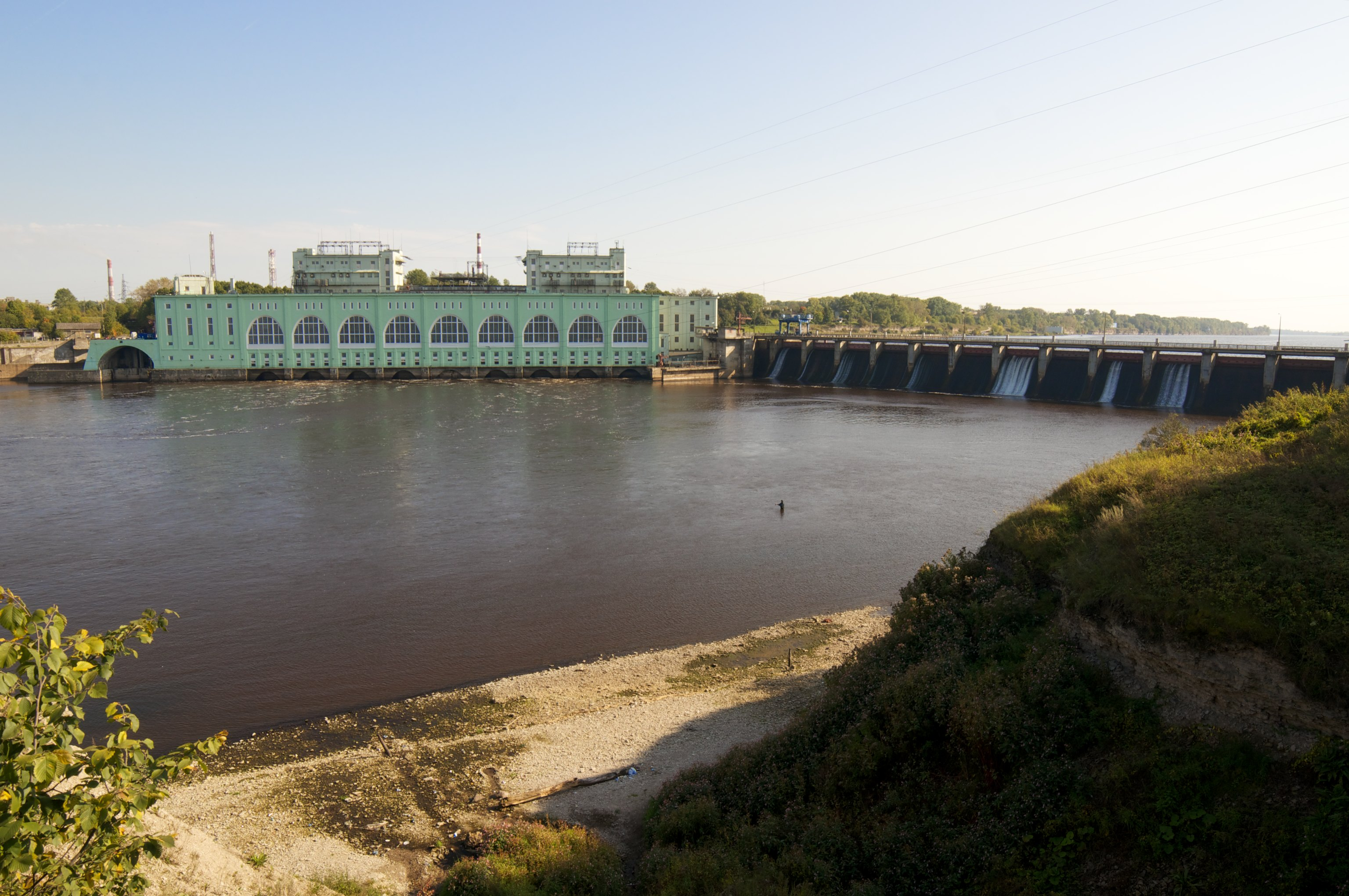 Волховская ГЭС